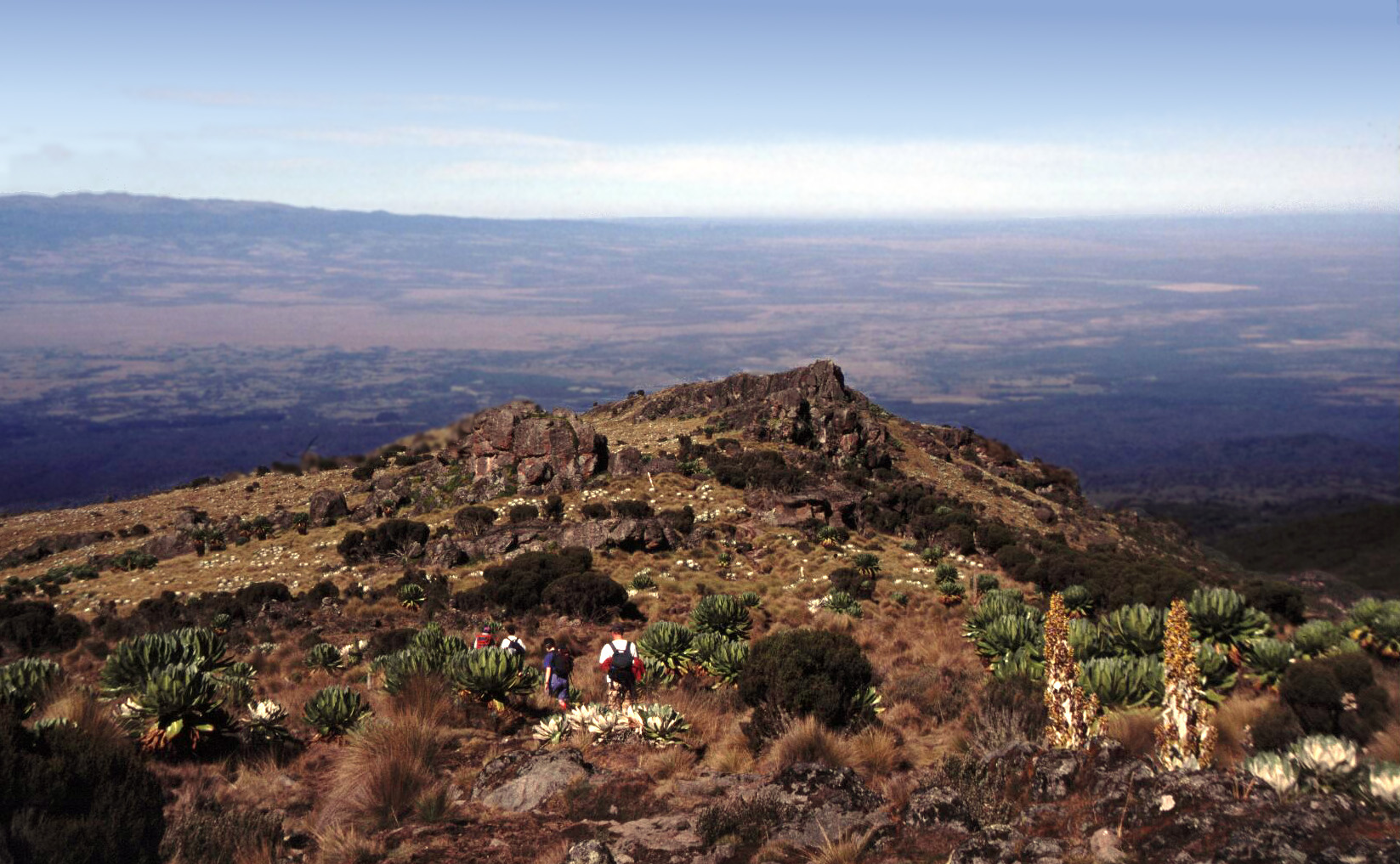 Senecio and lobelia on Mount KenyaMount Kenya